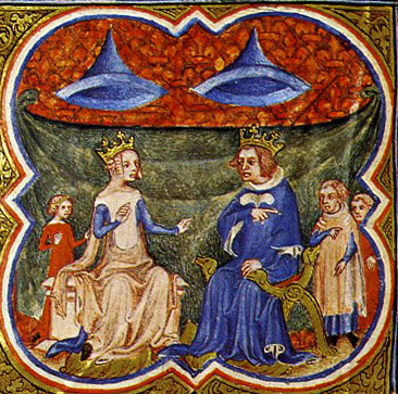 Karel V. s rodinou